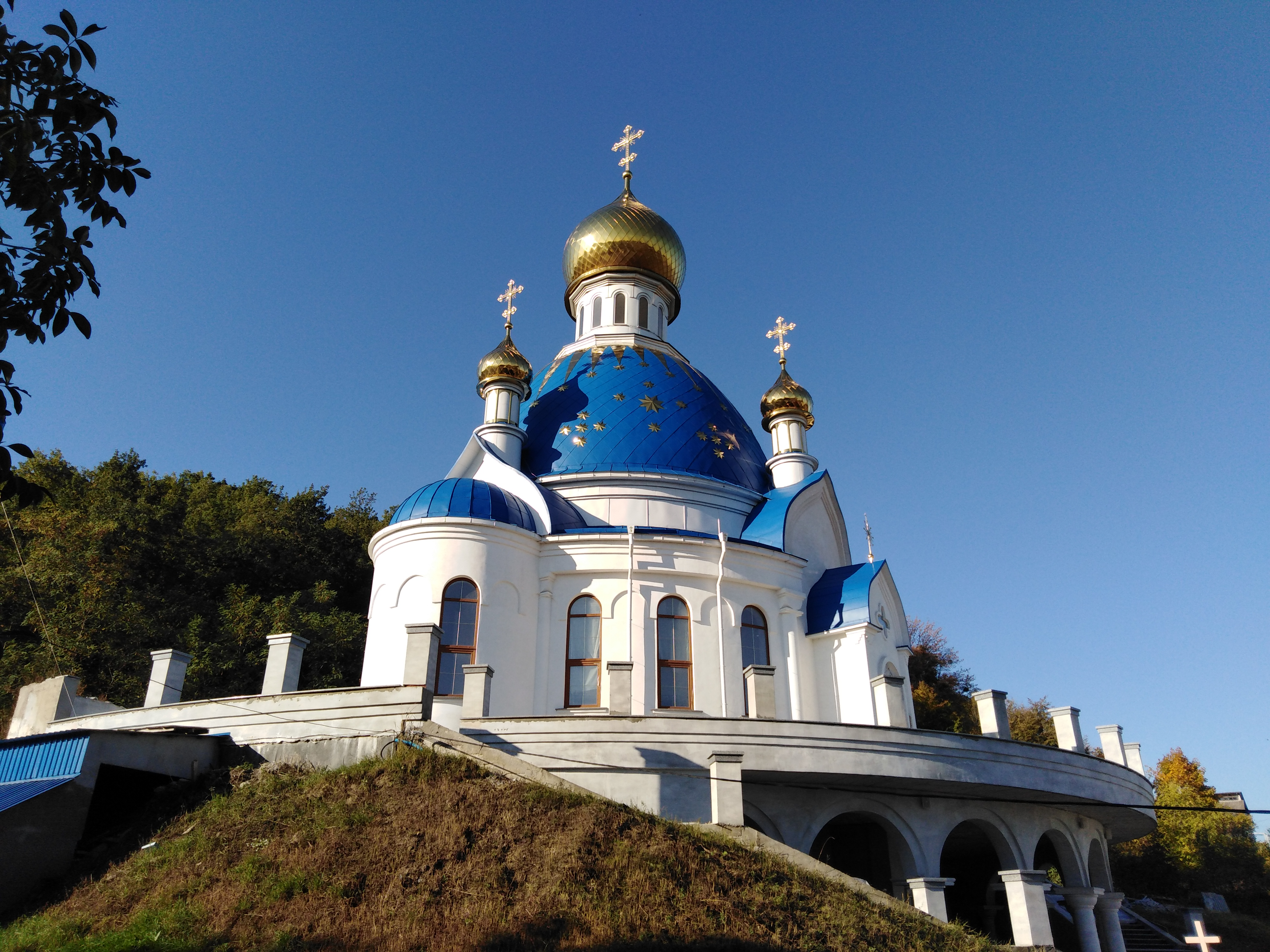 Україна. Харківська область, Зміївський район, с. Водяне. Борисоглібський монастир, храм Преображення Господнього. 2018 рік